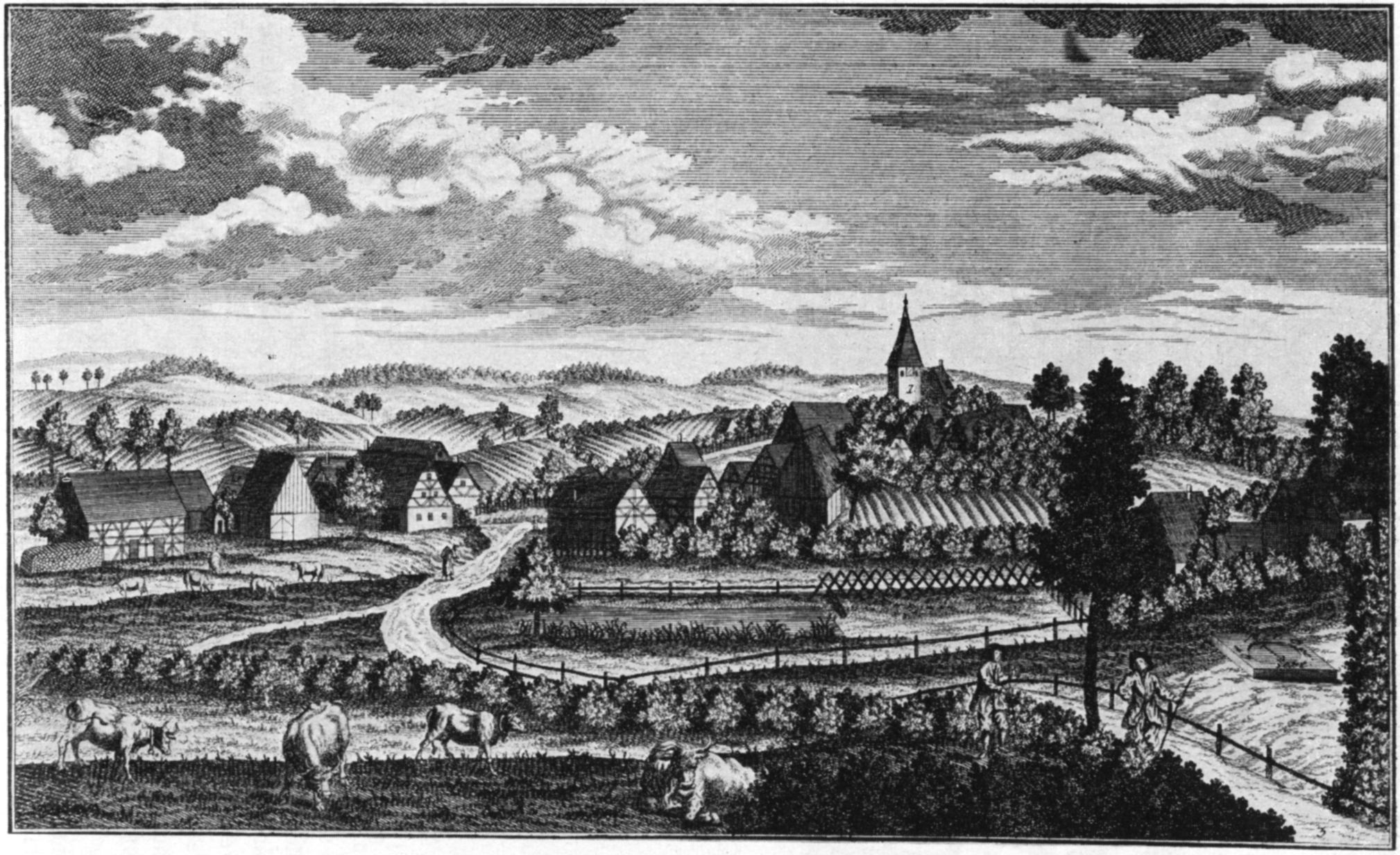 Kupferstich, Ansicht von Gustenfelden